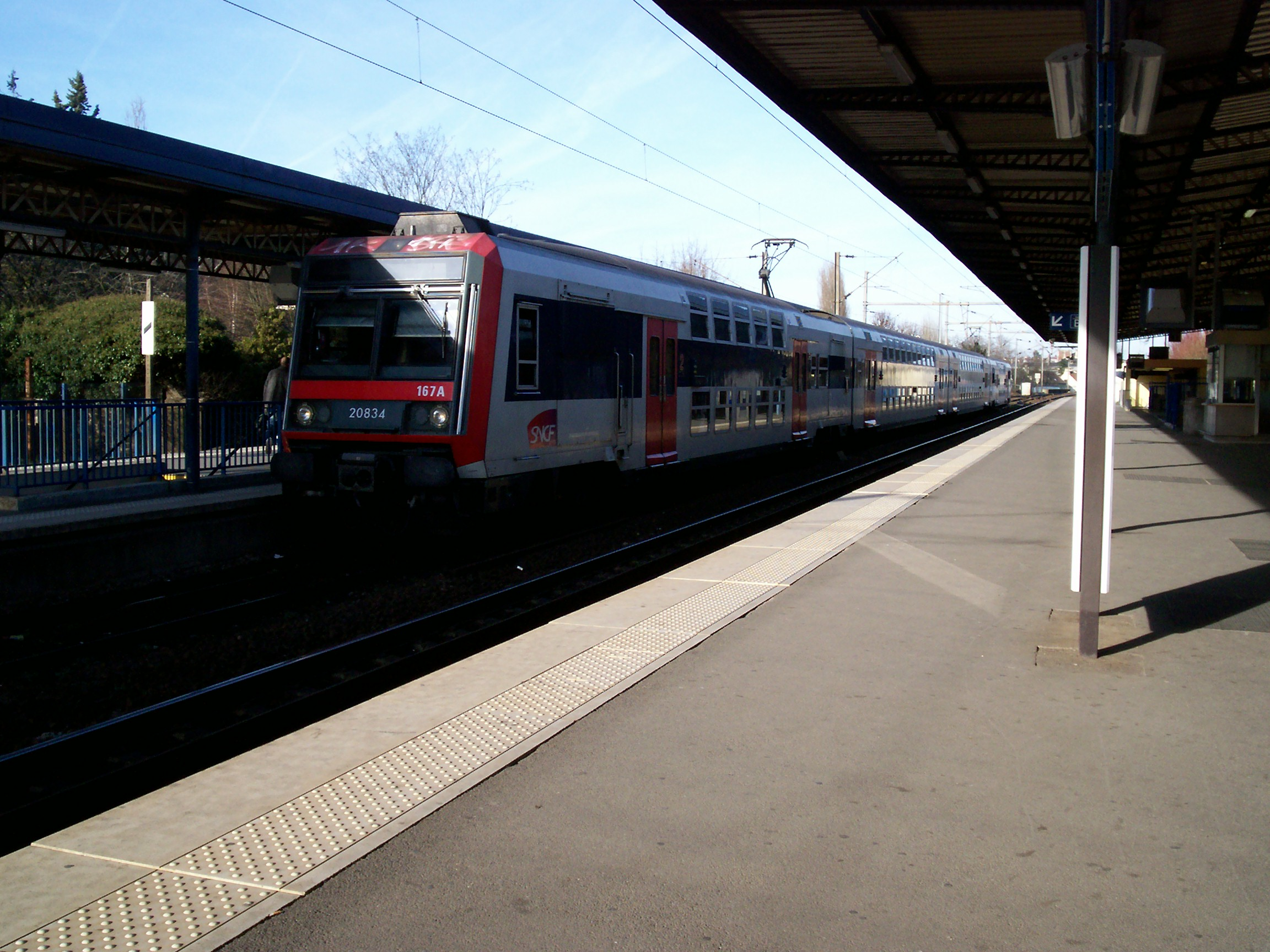 Train PERI en gare de départ de Meaux